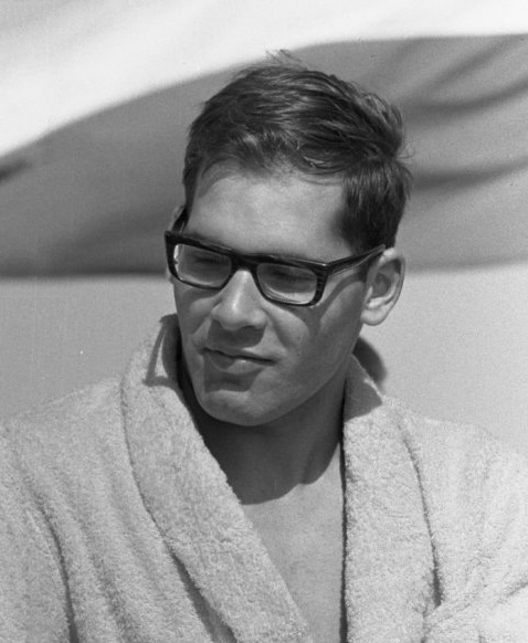 Rob van Empel